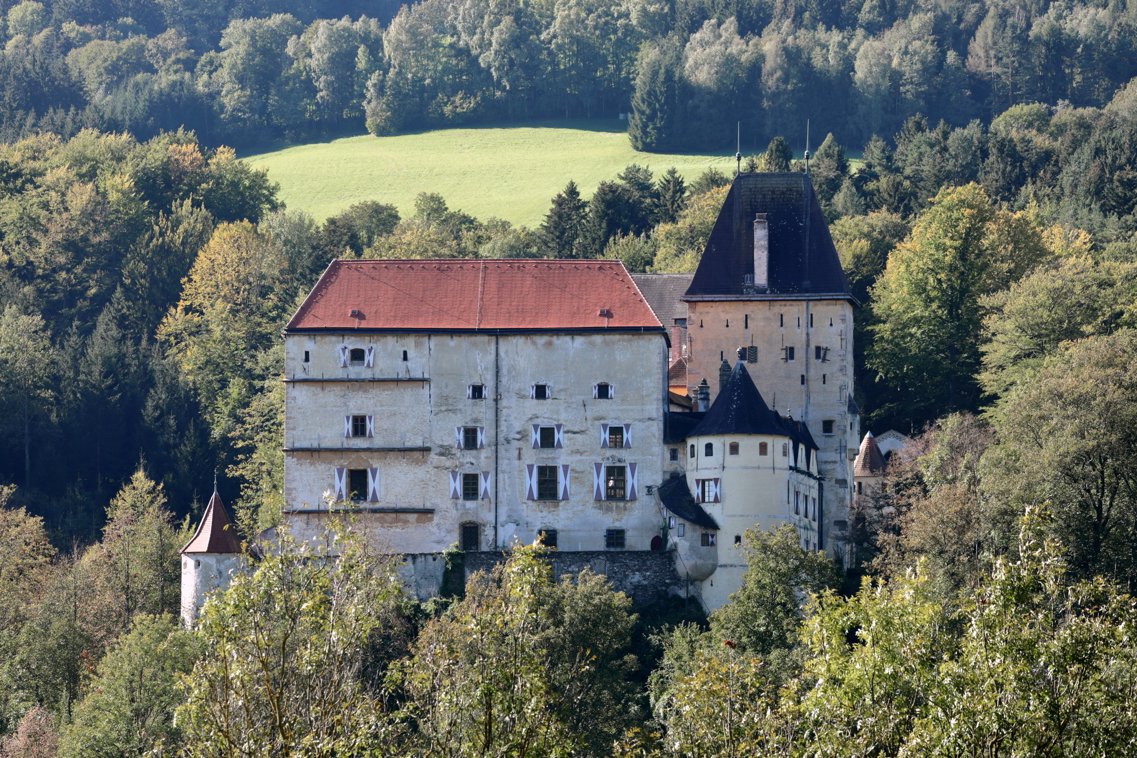 Nordansicht der Burg in der niederösterreichischen Gemeinde Feistritz am Wechsel.Die Burg, südöstlich über dem Ort gelegen, wurde vermutlich im 12. Jahrhundert errichtet. Um 1500 fand ein spätgotischer Umbau bzw. eine Erweiterung statt. Ein weiterer großzügiger Umbau erfolgte ab 1685. 1815 kam die Anlage in den Besitz von Josef Dietrich (1780–1855), Freiherr von Dietrichsberg,, der sie im Stil der Romantik erneuerte und ihr im Wesentlichen das heutige Erscheinungsbild gab, wobei der Torturm erst 1922/24 aufgestockt wurde.